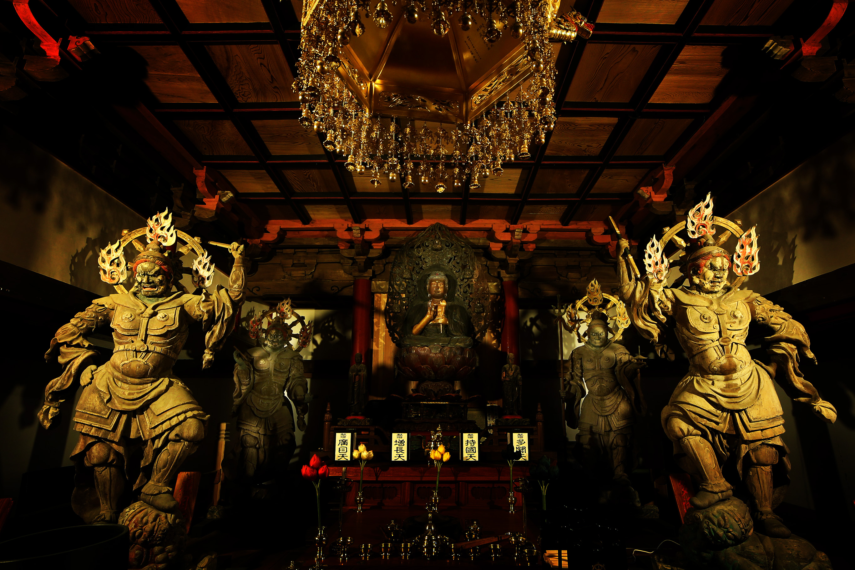 勝覺寺釈迦堂の四天王尊